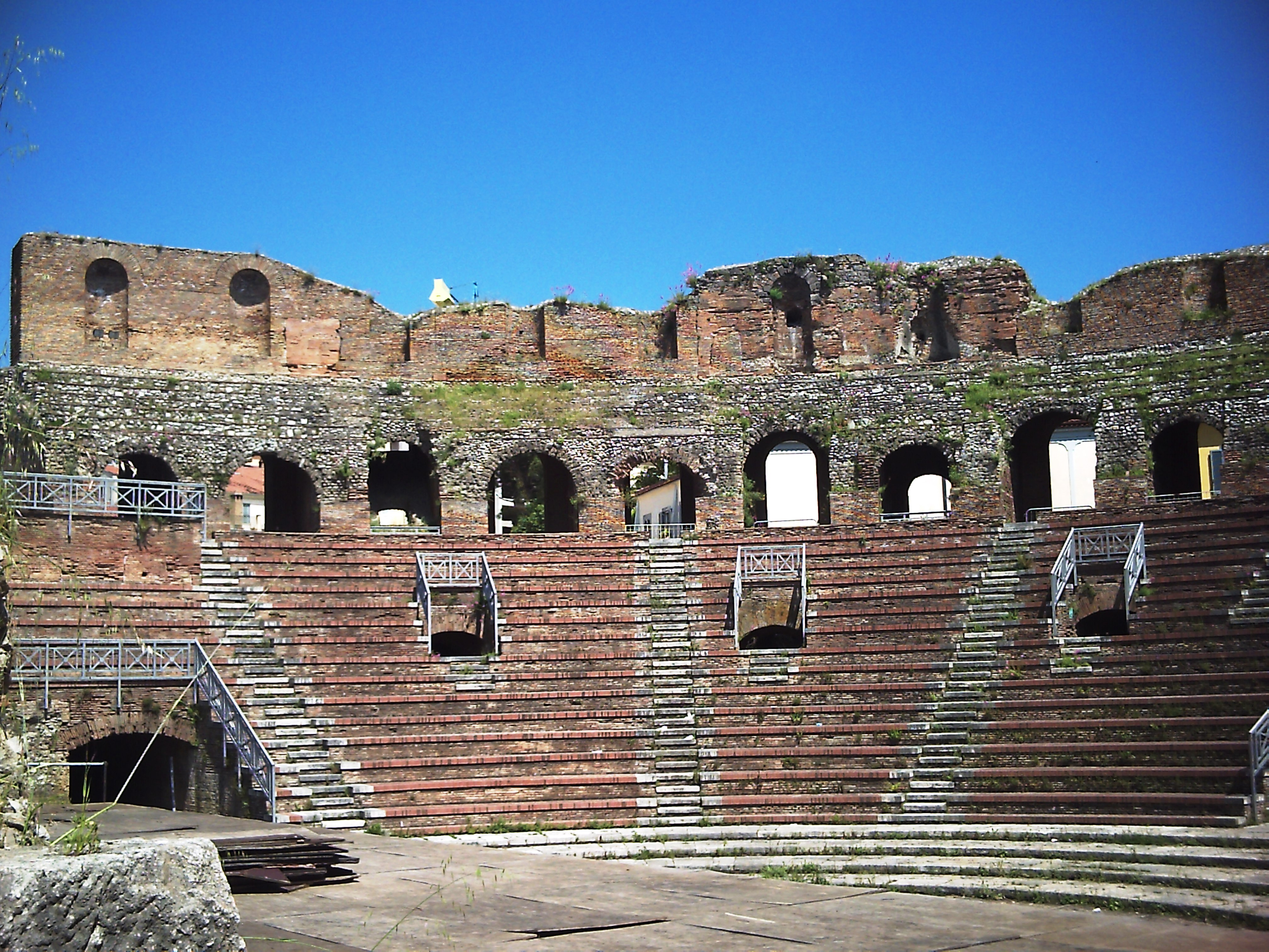 Particolare del Teatro romano di Benevento